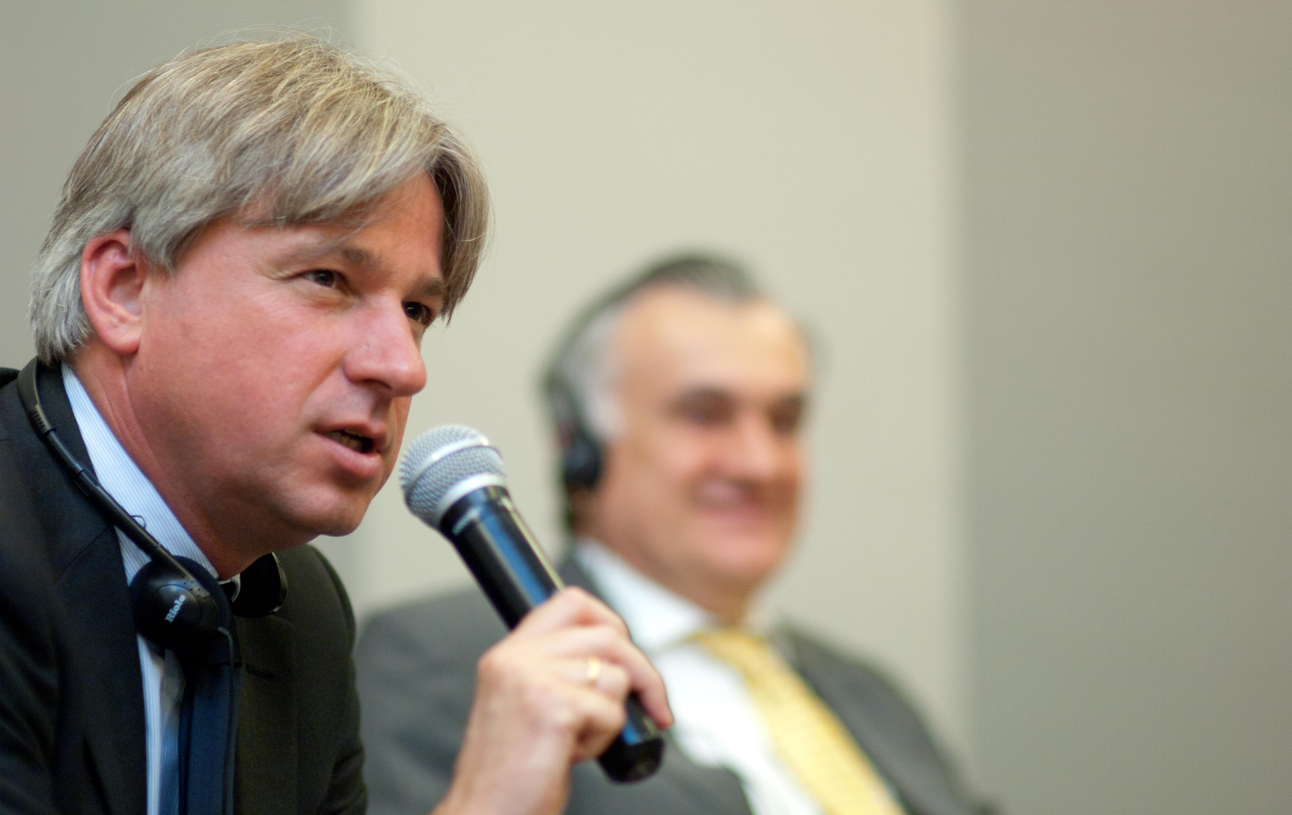 Diretor da Feira do Livro de Frankfurt, Juergen Boos no Anúncio de iniciativa conjunta entre o Brasil e a Feira do livro de Frankfurt.